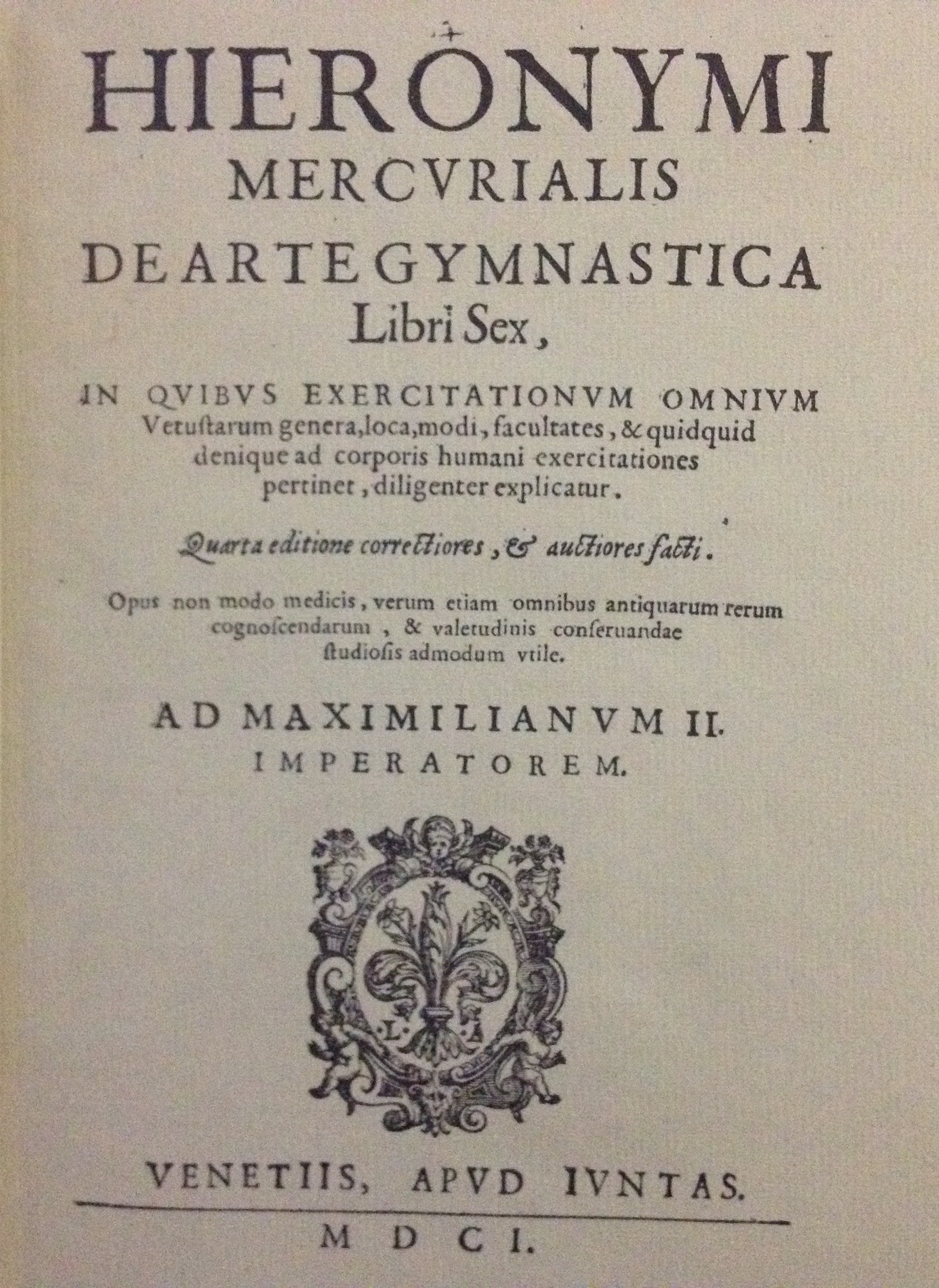 Riproduzione fotografica del frontespizio dell'opera "De arte gumnastica", di Girolamo Mercuriale